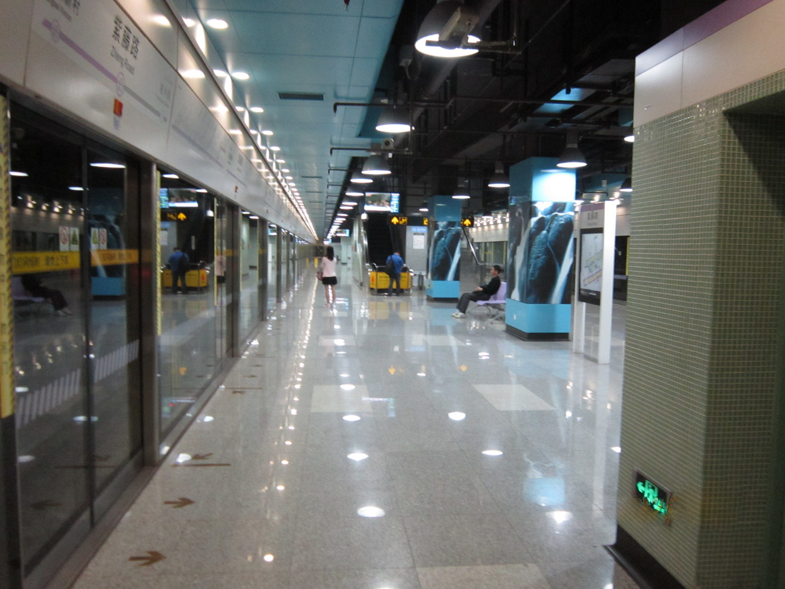 上海轨道交通迷10号线紫藤路站站台